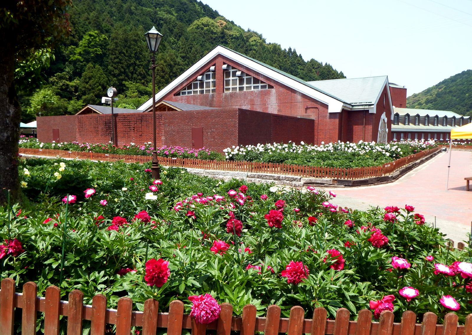 マイントピア別子の本館